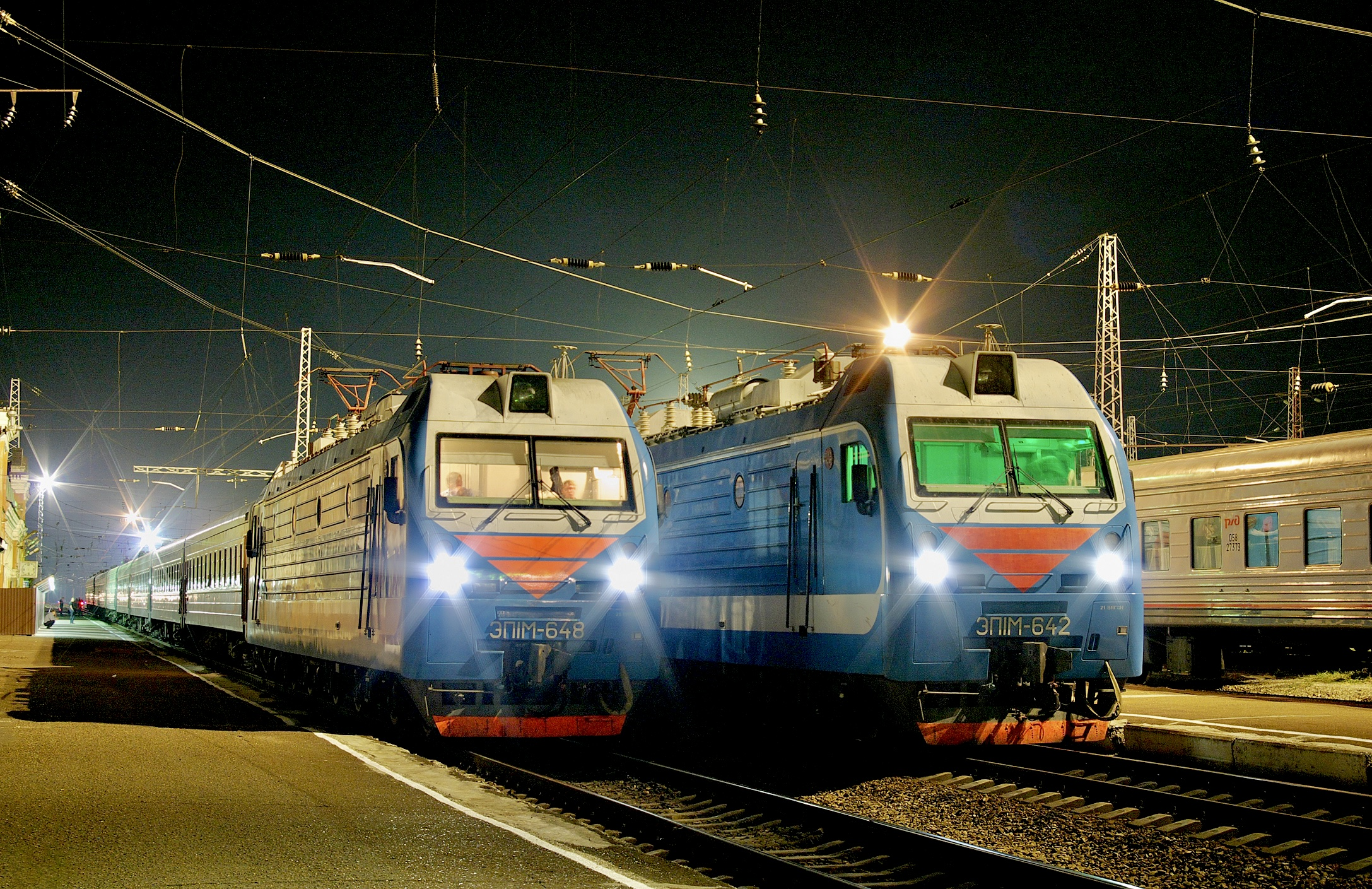 Поезда с электровозами ЭП1М на станции Тихорецкая